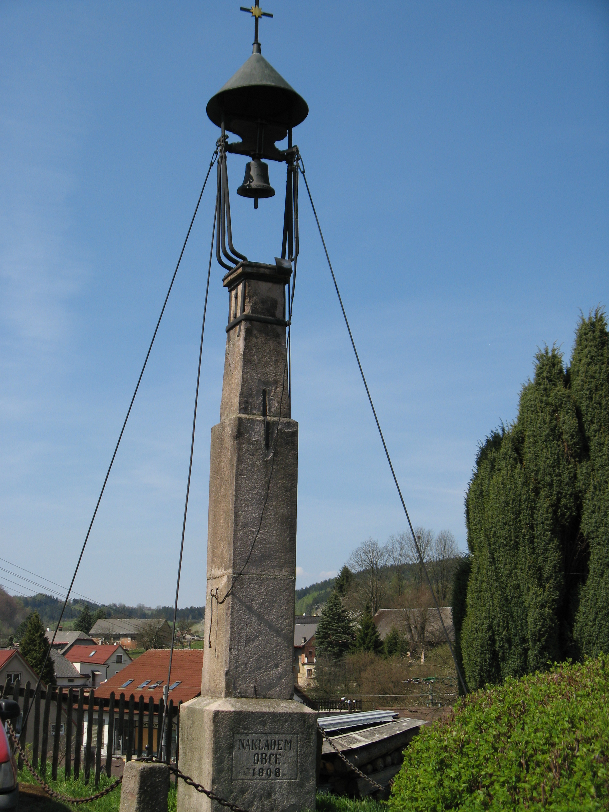 Zvonička byla postavena roku 1898 nákladem obce z kamenných kvádrů z místního lomu pana Adolfa Draboně.